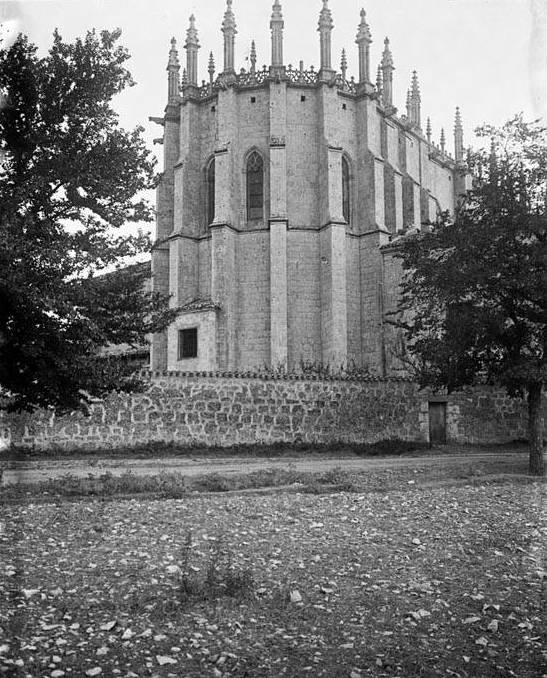 Imatge